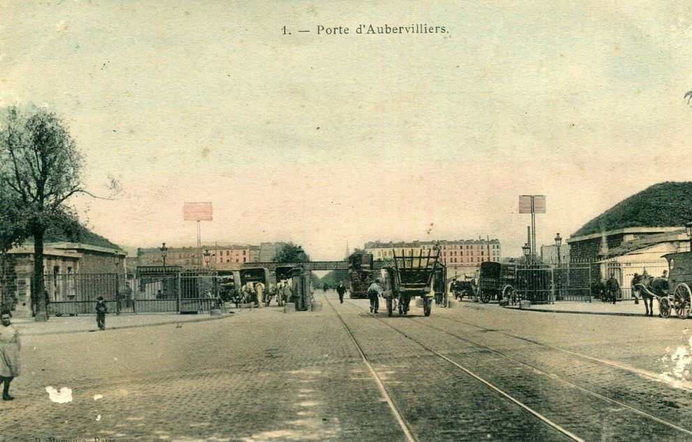 Paris.Porte d'Aubervilliers